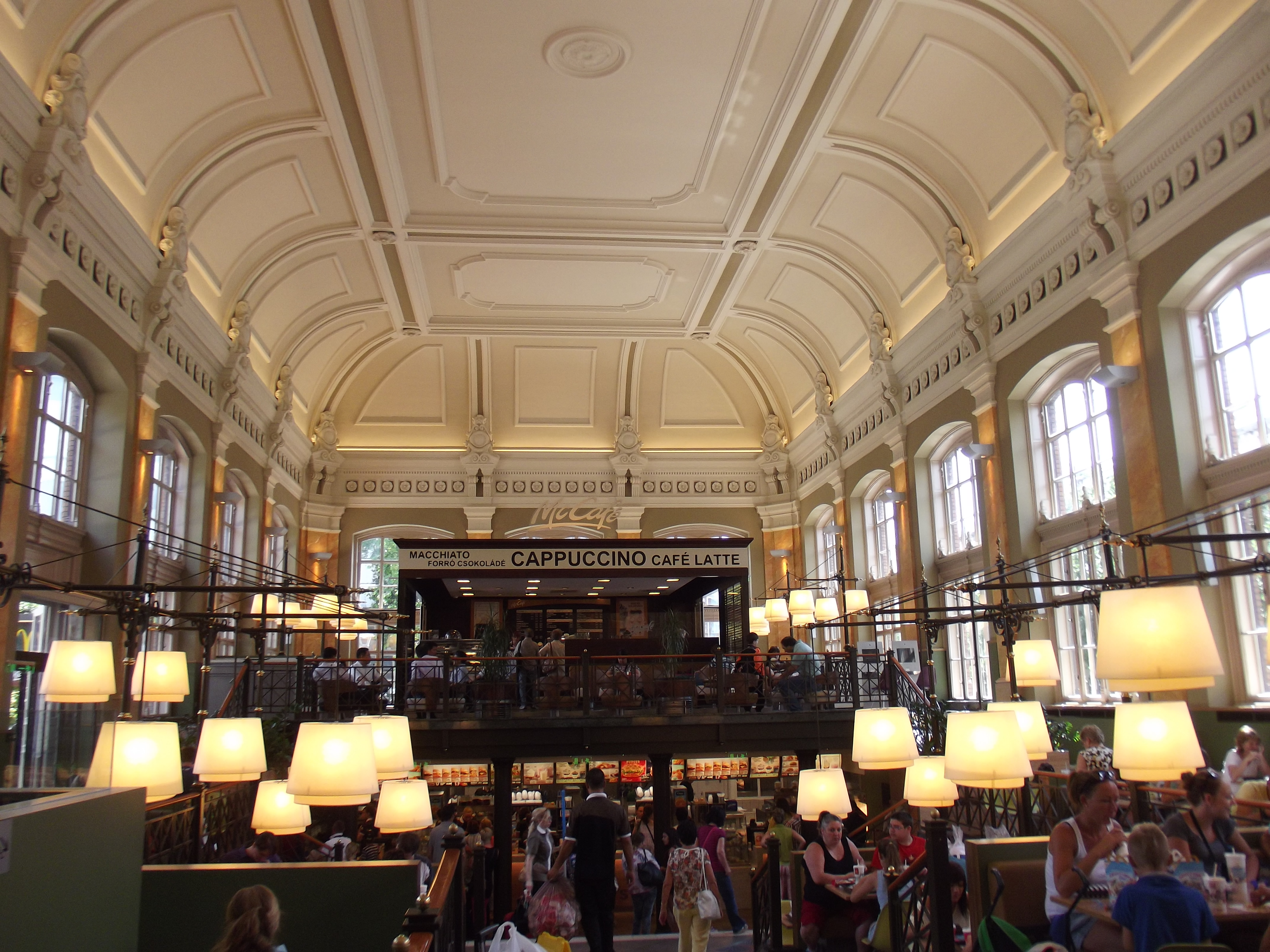 Omgebouwde wachtzaal in een cafe/restaurant